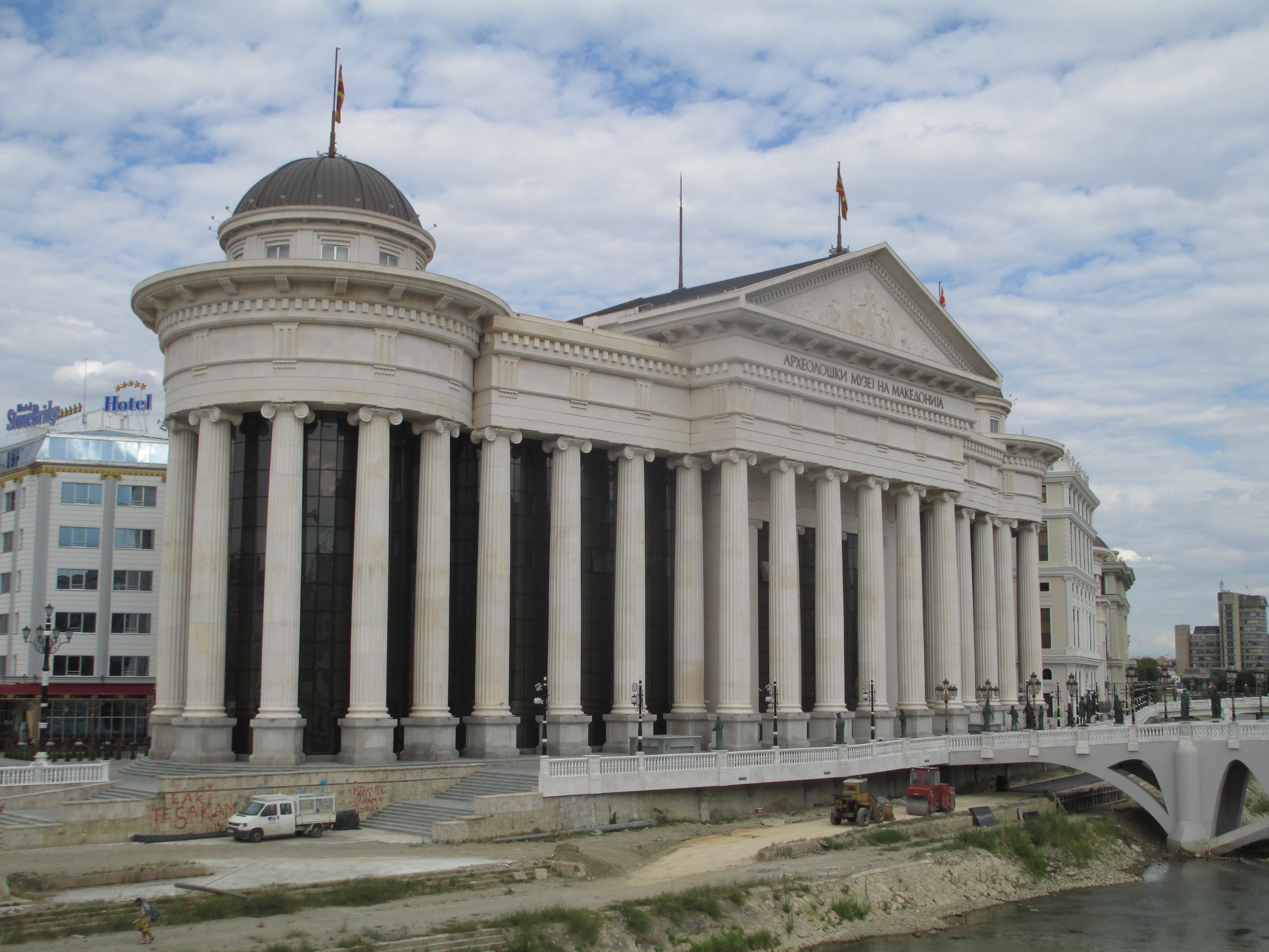 המוזיאון הארכיאולוגי של מקדוניה בסקופיה